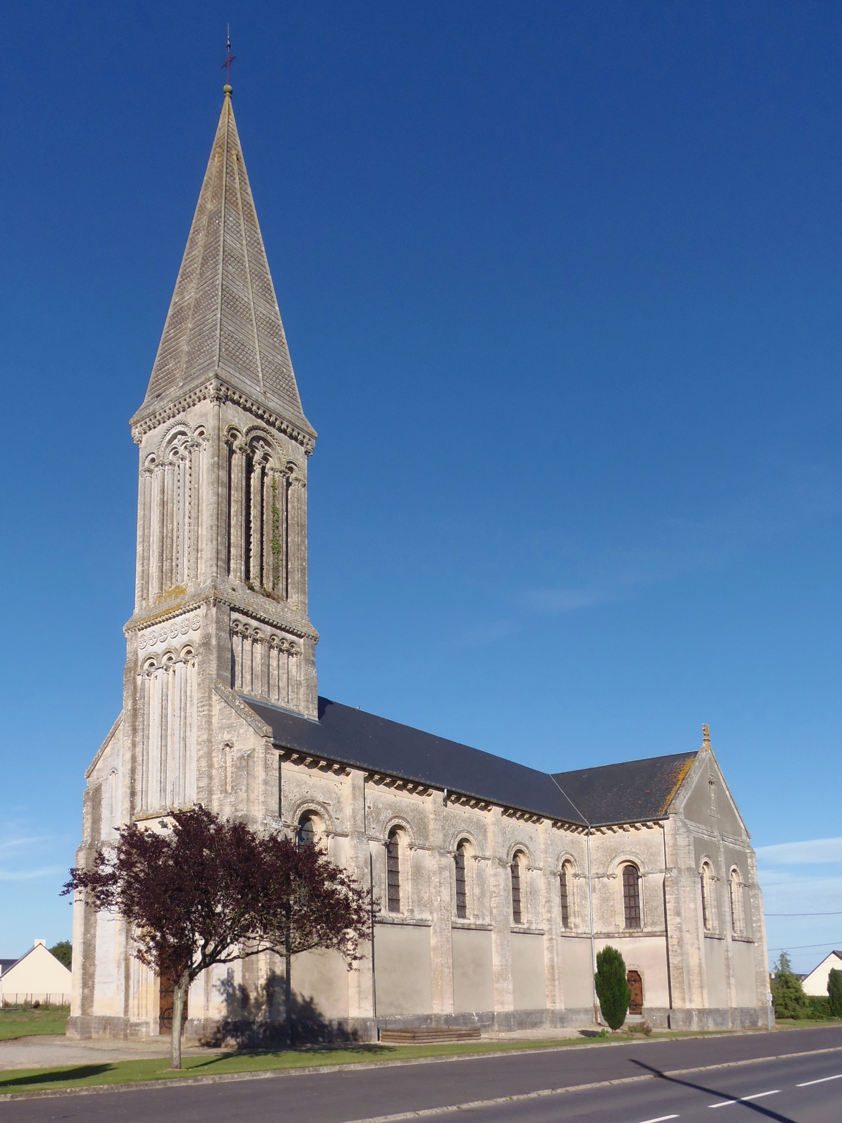 Le Molay-Littry (Normandie, France). L'église Saint-Clair du Molay.